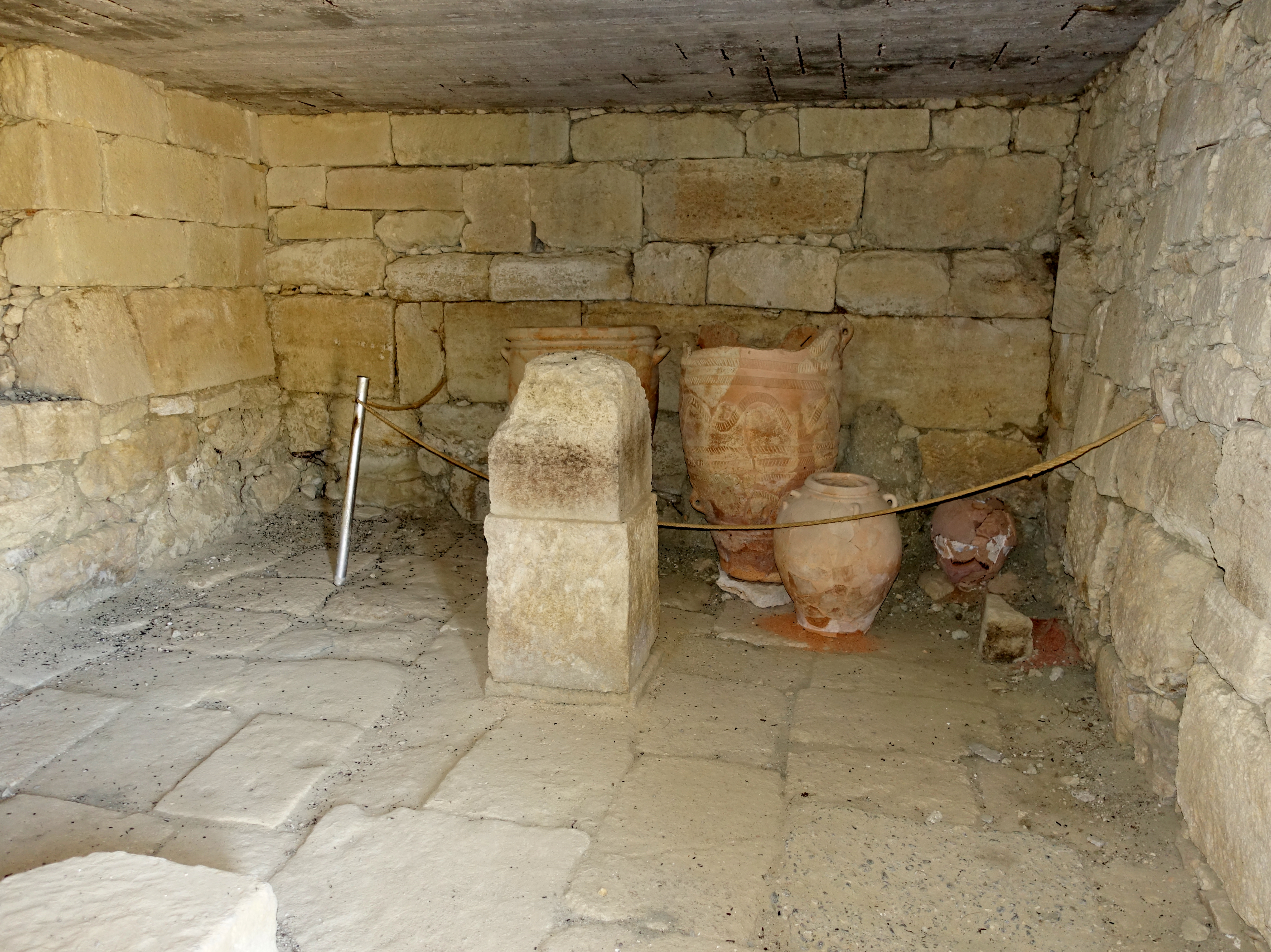 Pithoi in der Ausgrabungsstätte der „Villa“ von Vathypetro (Βαθύπετρο), Gemeinde Archanes-Asterousia, Kreta, Griechenland